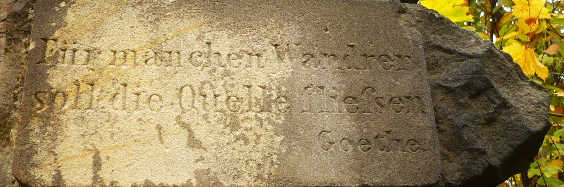 Sokołowsko - sentencja w języku niemiecki na ujęciu źródła leśnego / pomnik Leśne Źródełko (Waldquelle. "Für manchen Wandrer soll die Quelle fliefsen. Goethe/Dla niektórych turystów źródło powinno płynąć")